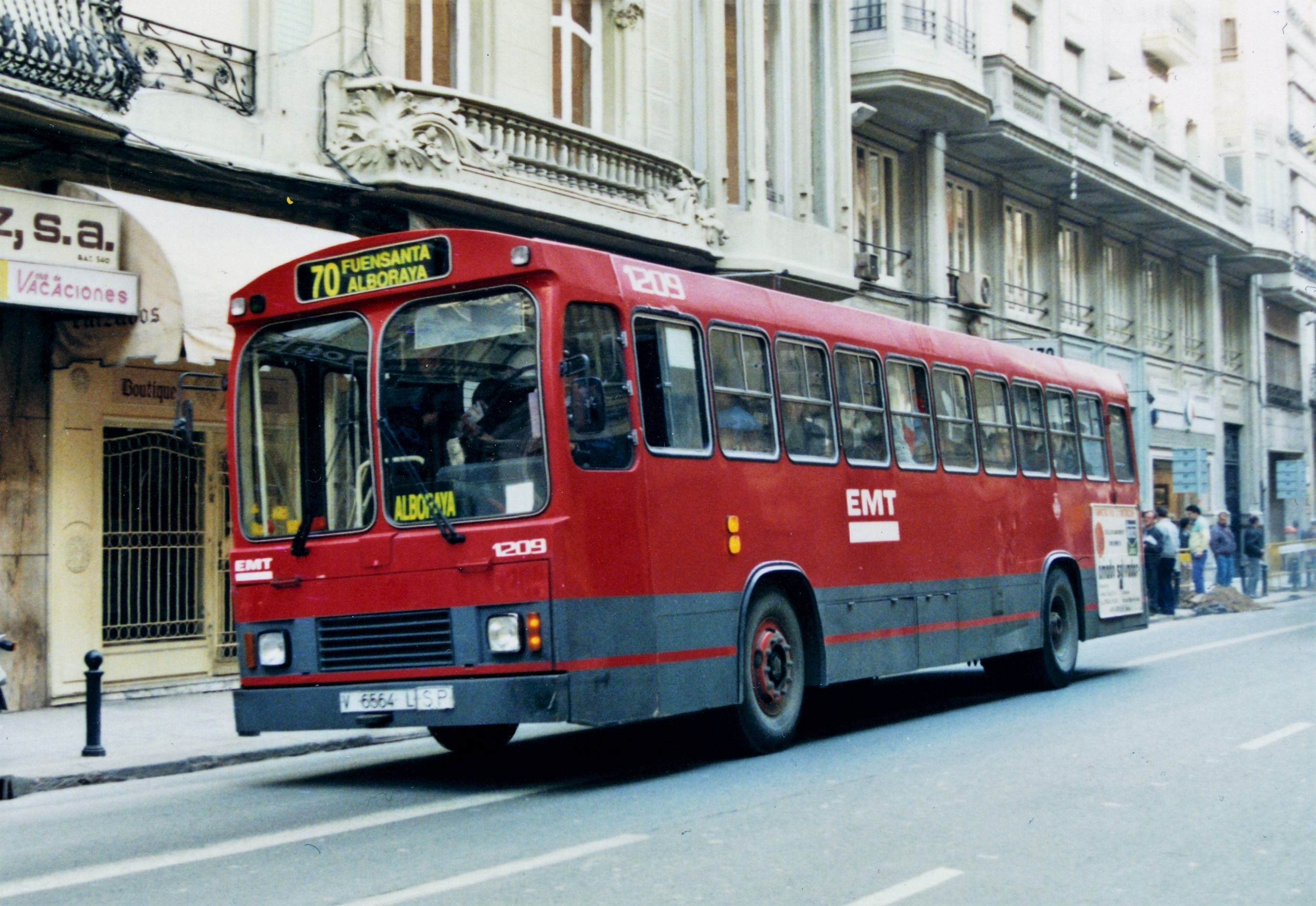 El 1209 de la EMT de Valencia es uno de los 40 Pegaso 6035/4 reconstruidos a partir de 1984 con una nueva carrocería de Iclorsal (anteriormente Cilsac).